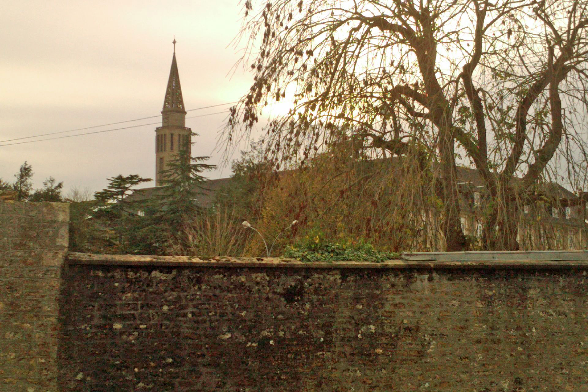 Chapelle du Bon-Sauveur au lieu-dit Pont-l'Abbé, dans la commune d'Étienville (Manche)